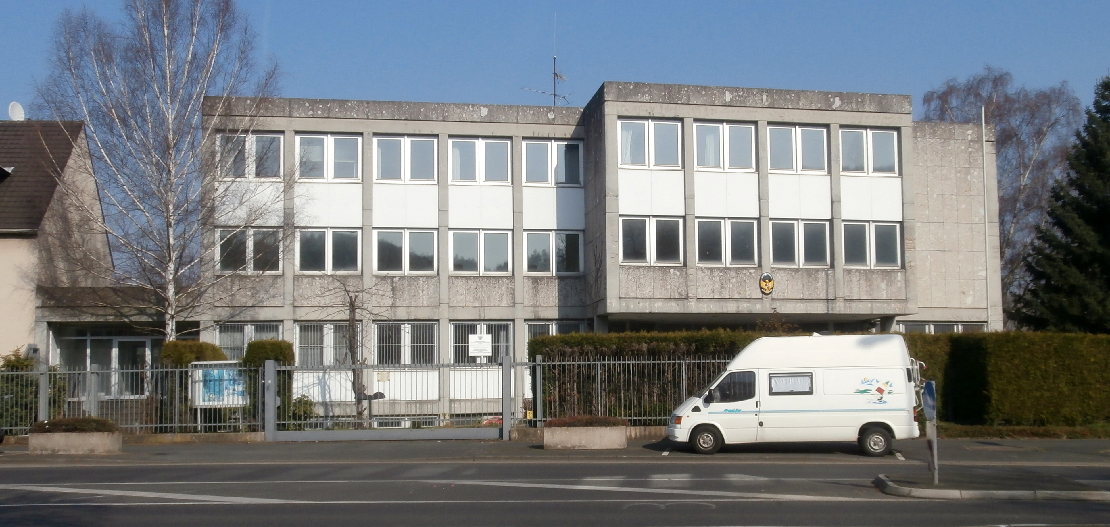 Außenstelle der Botschaft der Republik Indonesien, Bernkasteler Straße 2, Bonn-Godesberg-Nord